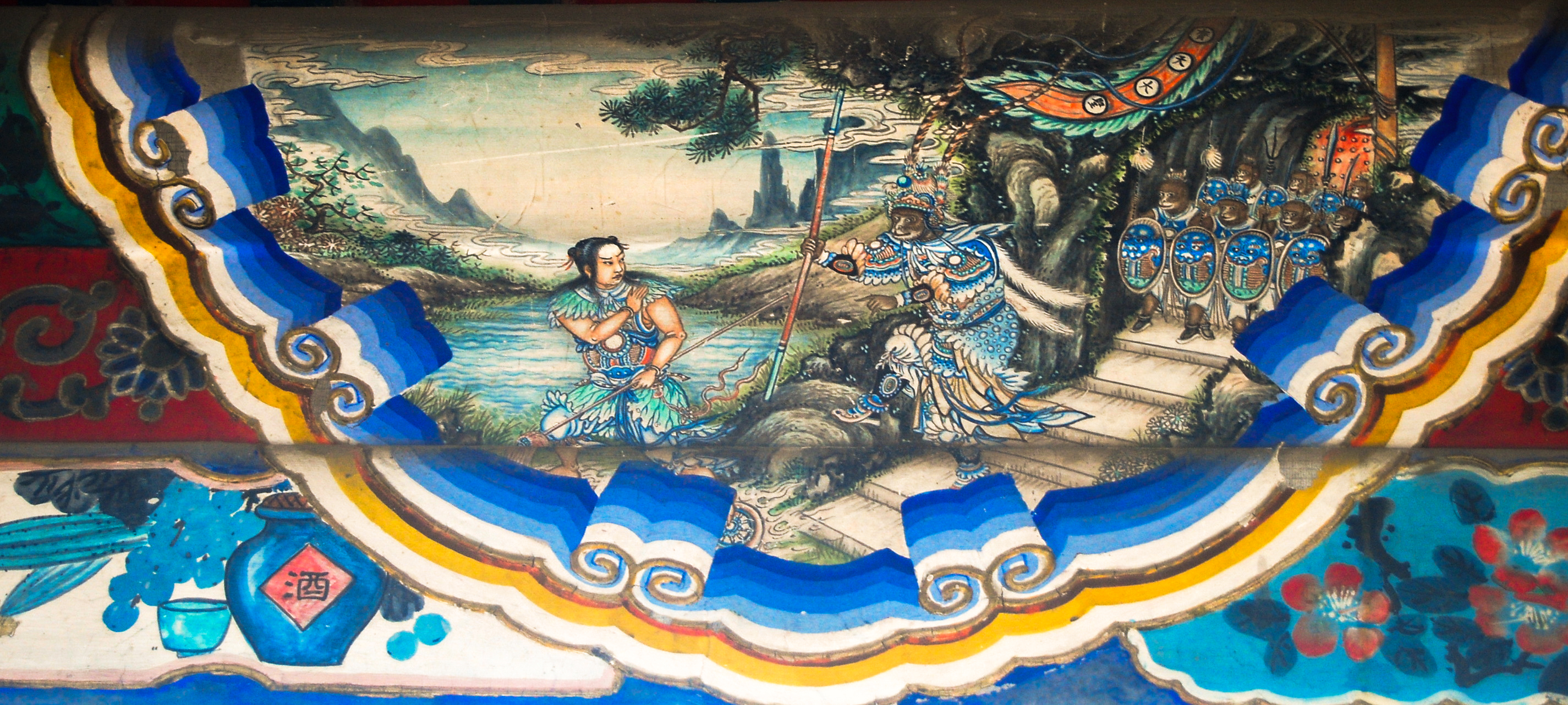 颐和园长廊彩绘：齐天大圣战哪吒